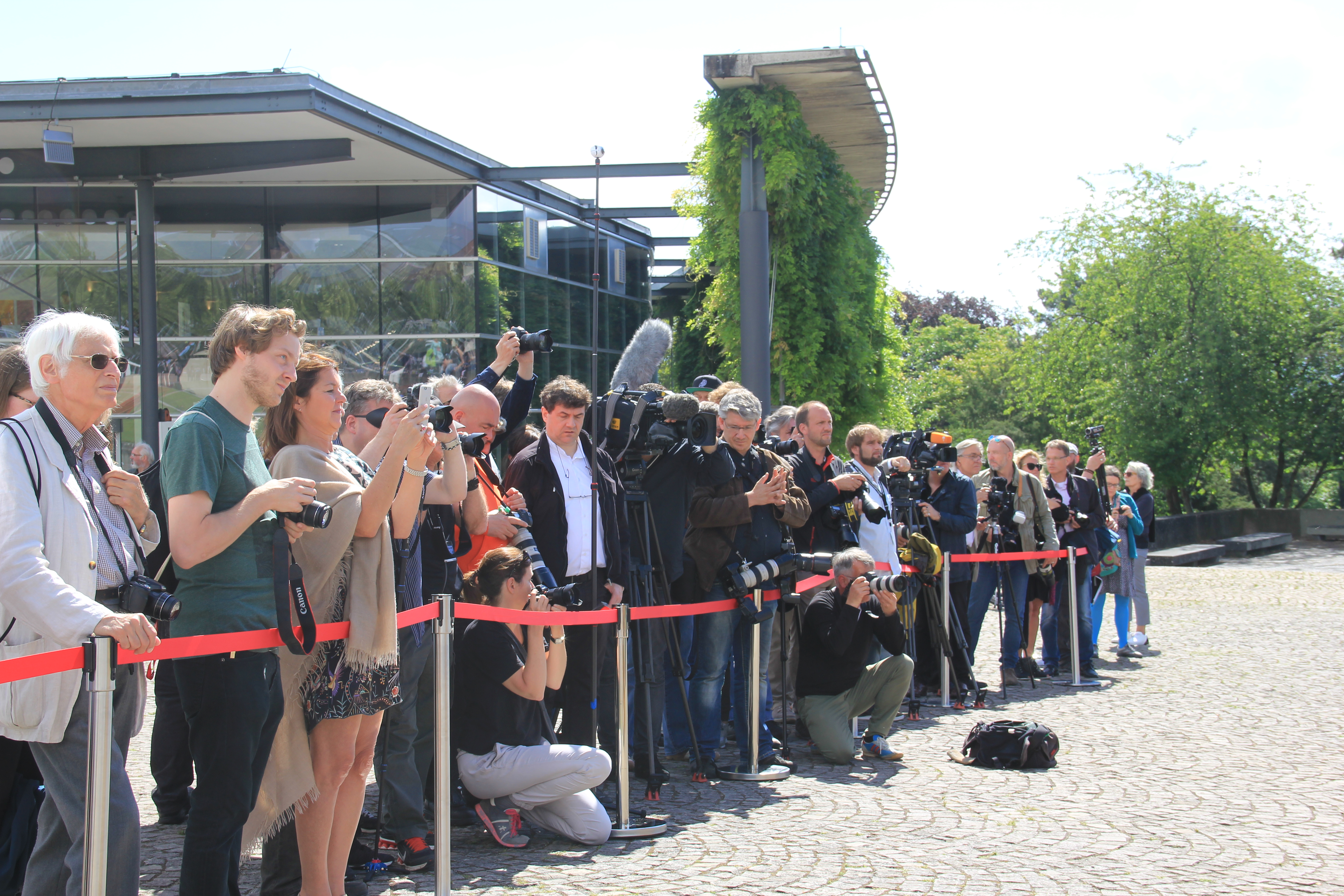 Journalisten und Fotografen warten in der Pressezone auf die prominenten Gäste bei der Eröffnung der Documenta 14